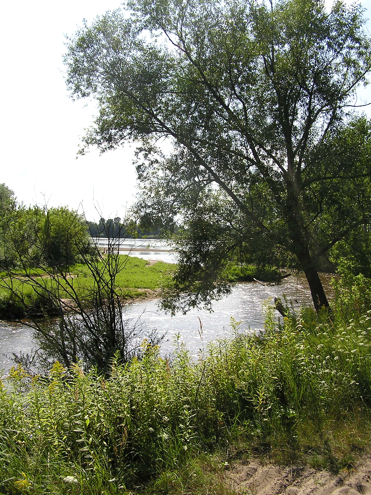 Zdjęcie wykonane z prawego brzegu Świdra przedstawia ujście tej rzeki do Wisły widocznej na dalszym planie.